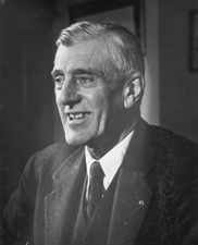 Leverett Saltonstall, US Senator from Massachusetts (1945-1967)